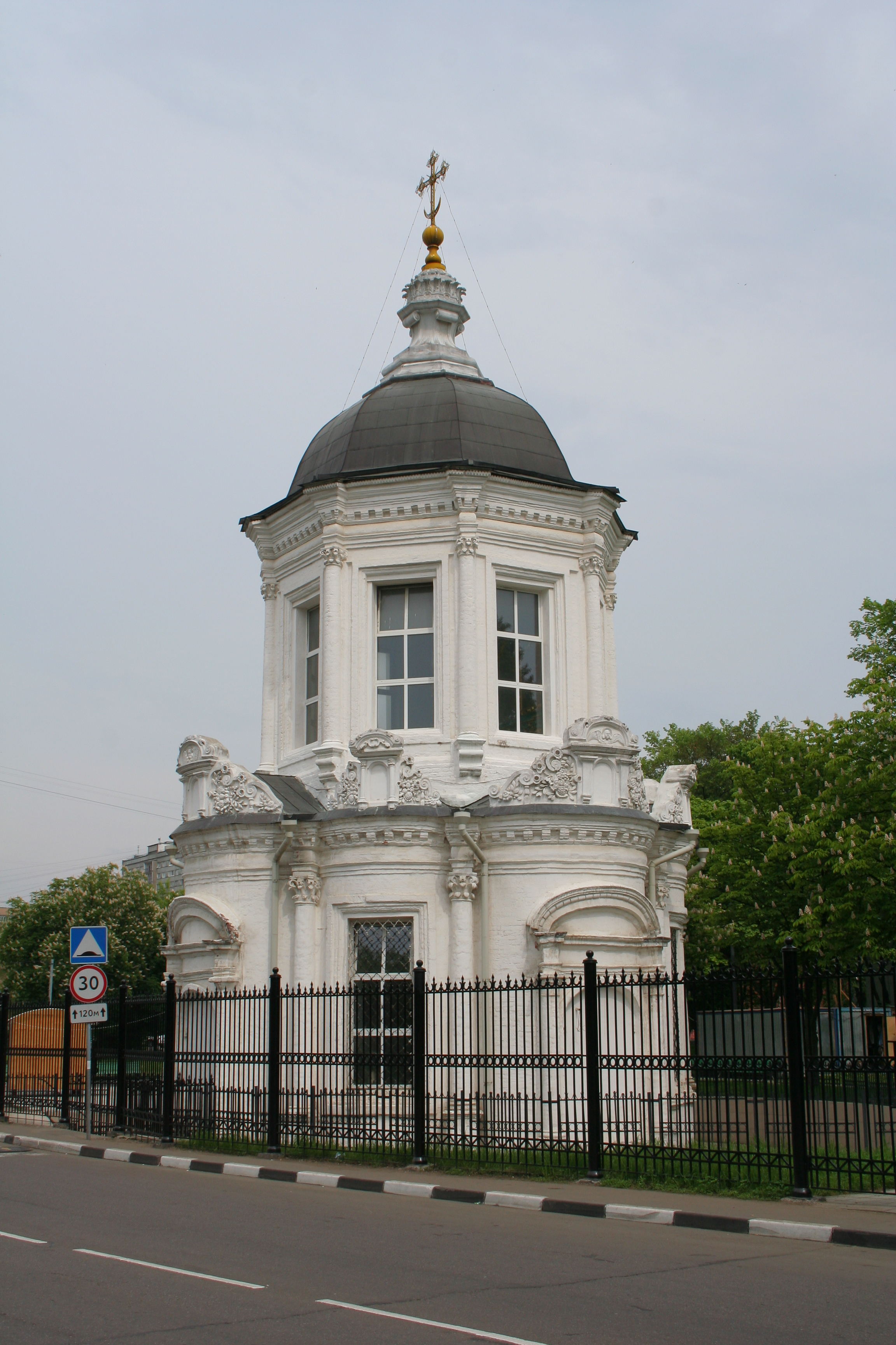 Kirche der Gottesmutter-Ikone vom Zeichen zu Perowo, Moskau